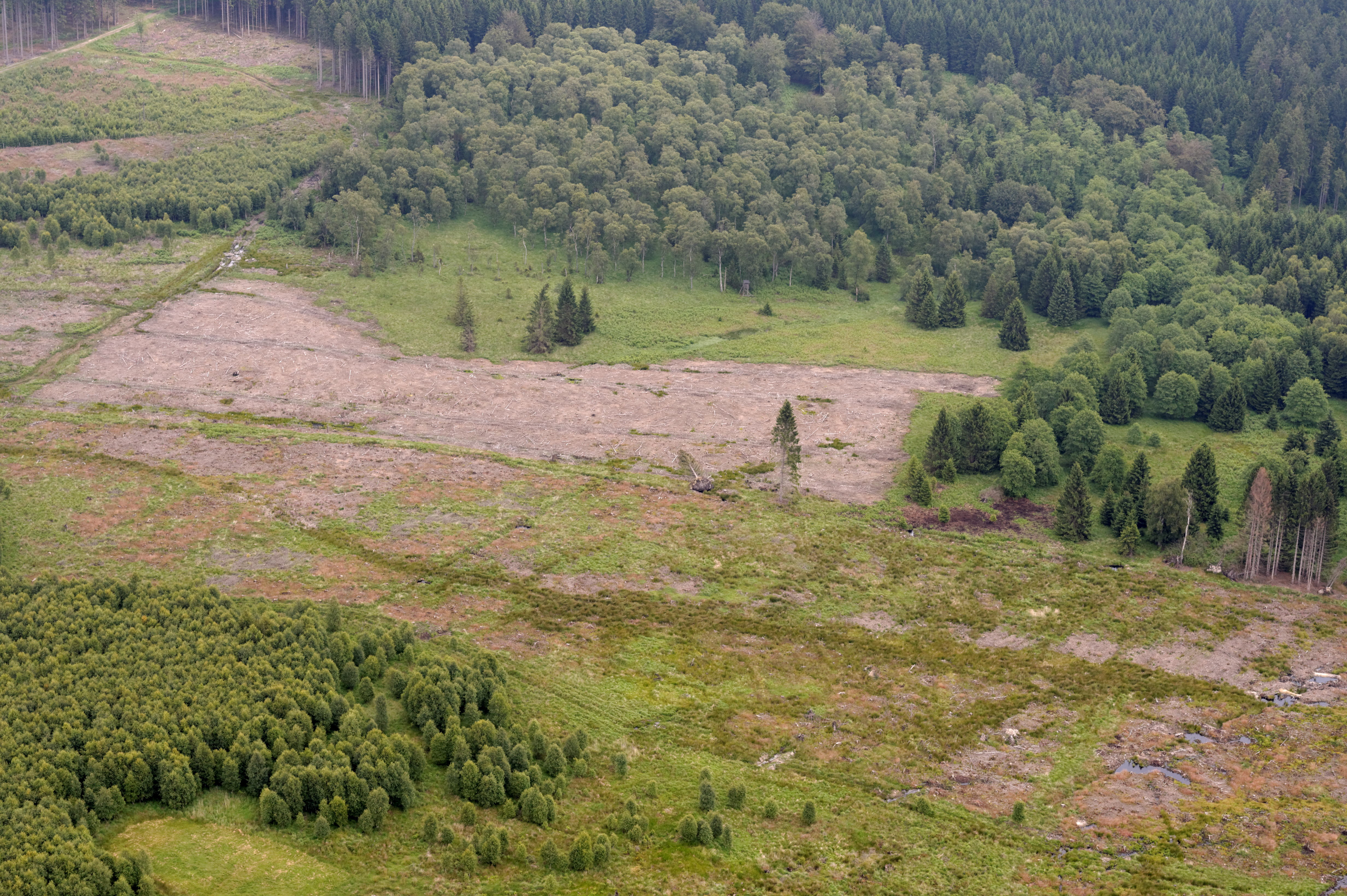 Fotoflug Sauerland Nord: Naturschutzgebiet „Hamorsbruch“ (vorne, Meschede) und Naturschutzgebiet „Hamorsbruch und Quellbäche“ (hinten, Warstein), ca. 1 km nordwestlich des Stimmstamms, Blick Richtung Nordosten